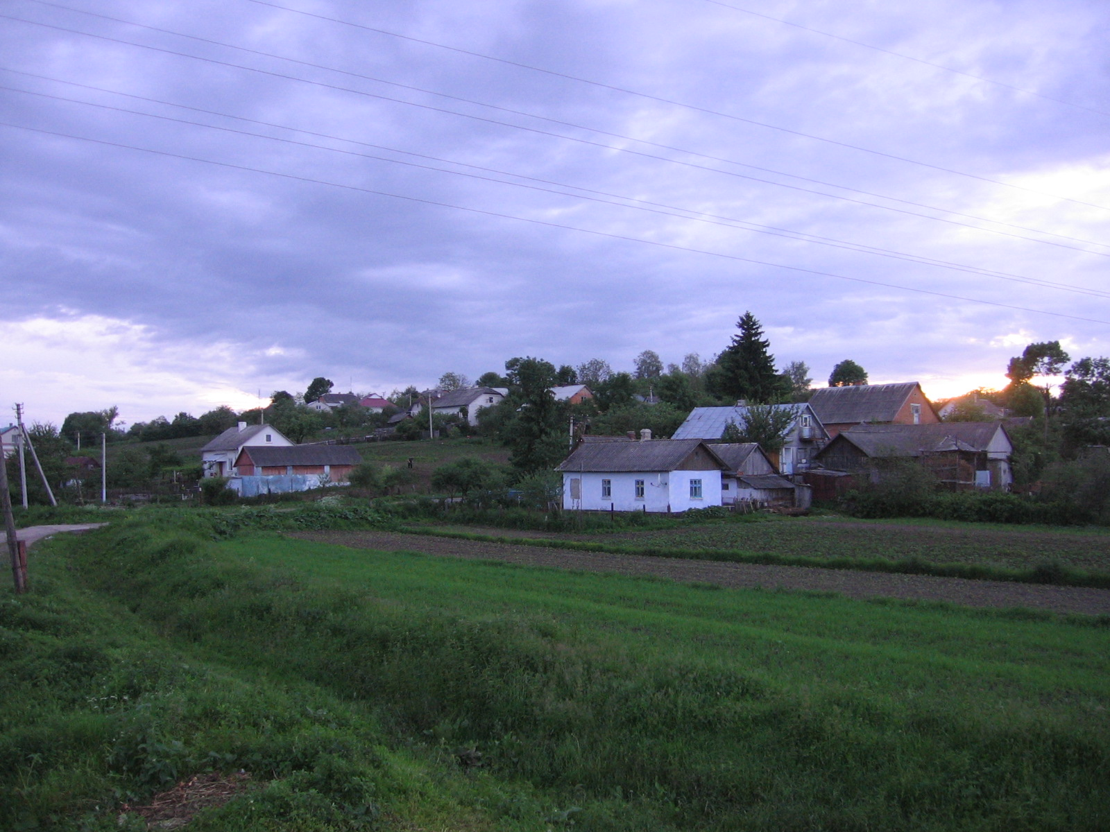 Holendry (Голендра) wieś Podhajce